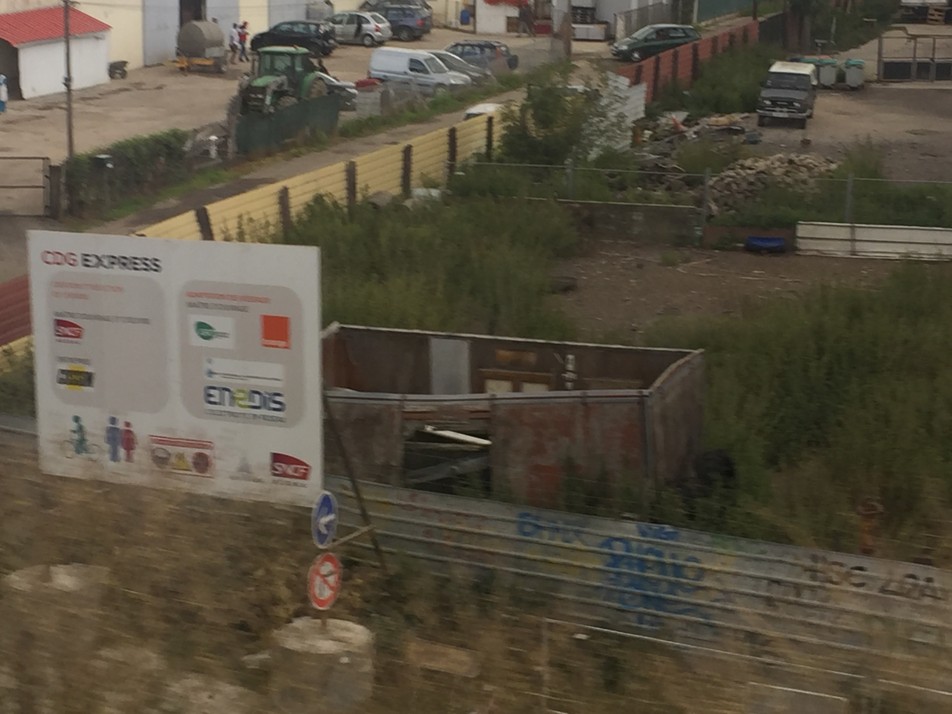 Panneau de chantier des travaux préparatoires de la ligne CDG Express à Mitry-Mory